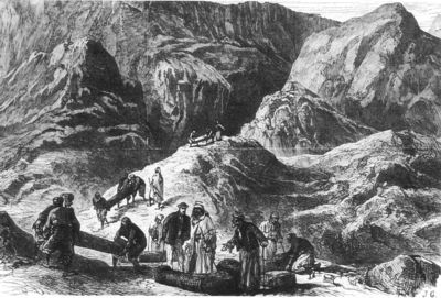 Zeitgenössische Darstellung der Bergung der Königsmumien in der "Cachette von Deir" el-Bahari von 1881 durch Emil Brugsch.